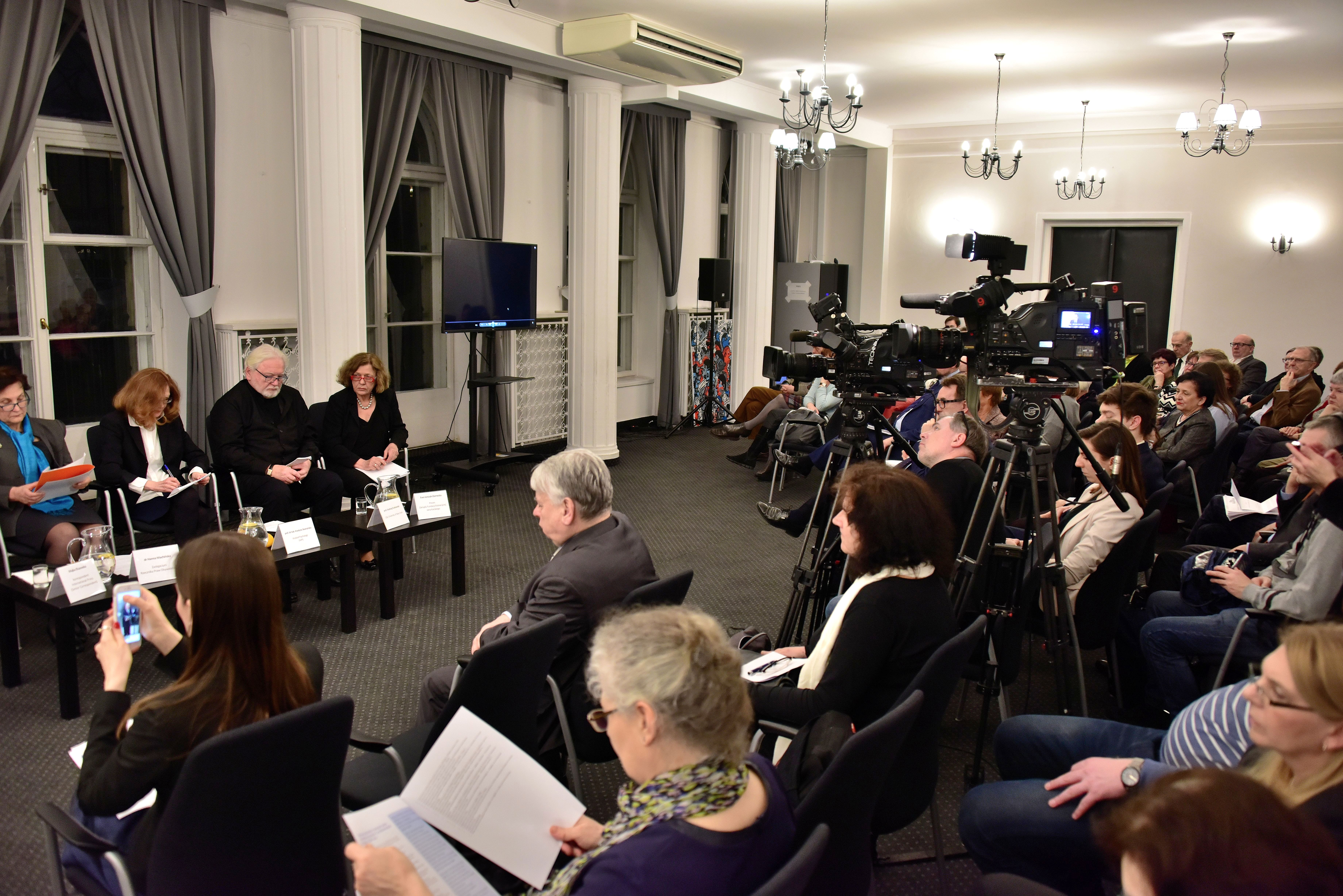 Debata Rzecznika Praw Obywatelskich "Rok 1968. Obywatelstwo: łaska władzy czy prawo?" Sala im. Władysława Bartoszewskiego, ul. Długa 23/25 w Warszawie